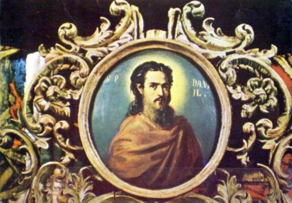 Prorocul Daniel de la Mănăstirea Agapia / carte poștală, un posibil autoportret al lui Nicolae Grigorescu